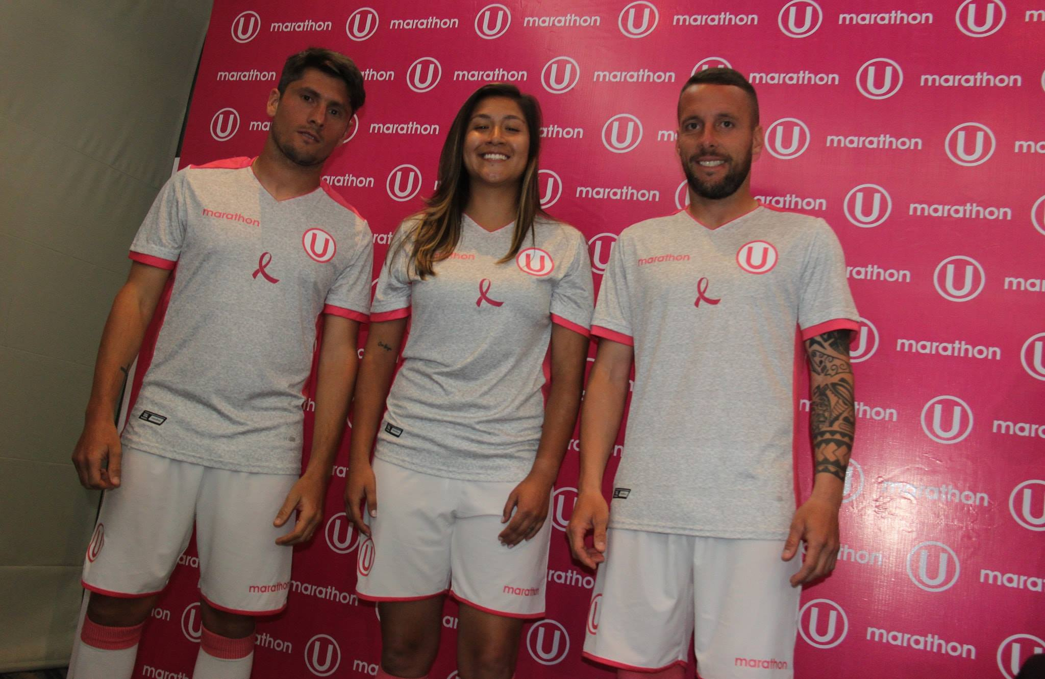 Camiseta en conmemoración por el día de la lucha contra el cáncer de mama.